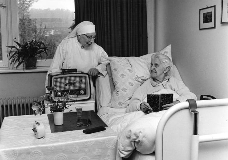 1961 Salzgitter Städt. Altersheim Maria im Tann In einem Krankenzimmer mit einer holländischen Ordensschwester